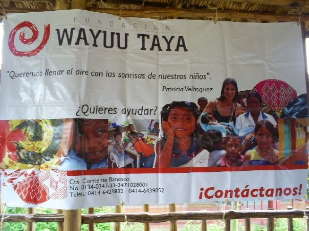 Valla colocada en ocasión de inaugurar una de las escuelas en la Guajira Venezolana presidida por Patricia Velásquez presidenta de la Fundación Wayú Taya Marzo 2011